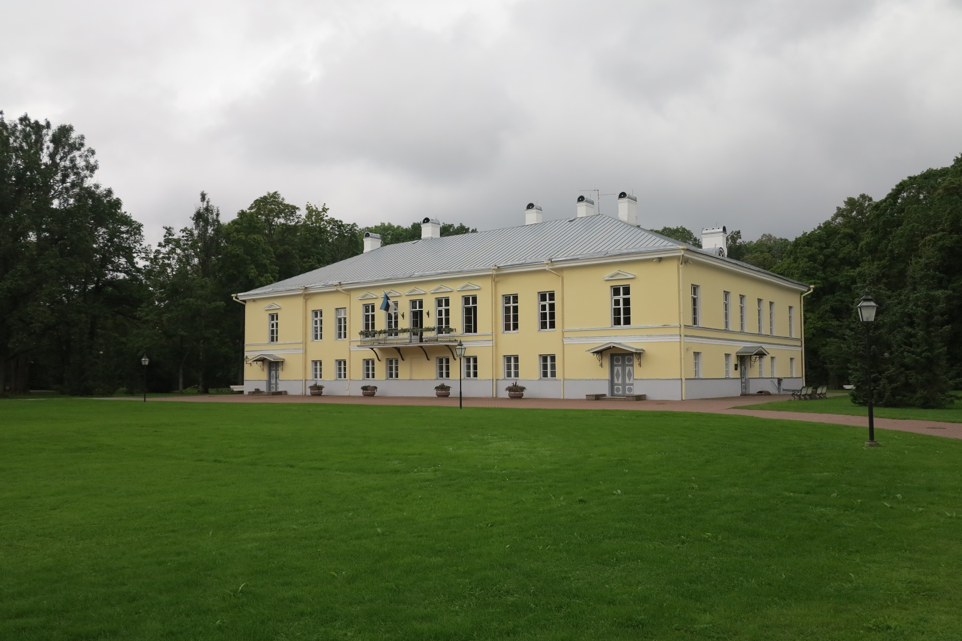 Mäetaguse mõisa peahoone 2012. aastal.